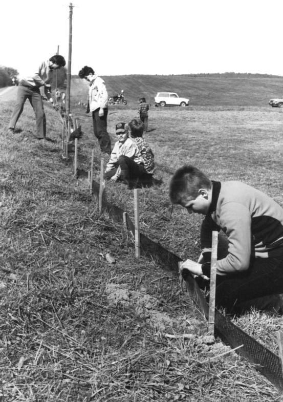 Krötenschutz, Bau eines Krötenzauns ADN-ZB Ludwig-15.4.1987 Bez.Erfurt: Erdkröten-Hochzeit-Einen Krötenschutzzaun bauen diese Arnstädter Schuler, Mitglieder der Arbeitsgemeinschaft Junge Biologen und Naturschutz-Freunde, an einer stark befahrenen Straße im Kreis Arnstadt Die unter strengem Schutz stehenden Froschlurche, die in Massen zu einem Laichteich bei Dannheim ziehen, werden vom Zaun aufgehalten und von Mitgliedern der Gesellschaft für Natur und Umwelt in Eimern gesammelt und zum Wasser getragen. Dabei werden die nützlichen Tiere - natürliche Feinde der Nacktschnecken - registriert. (siehe 5 und 6N